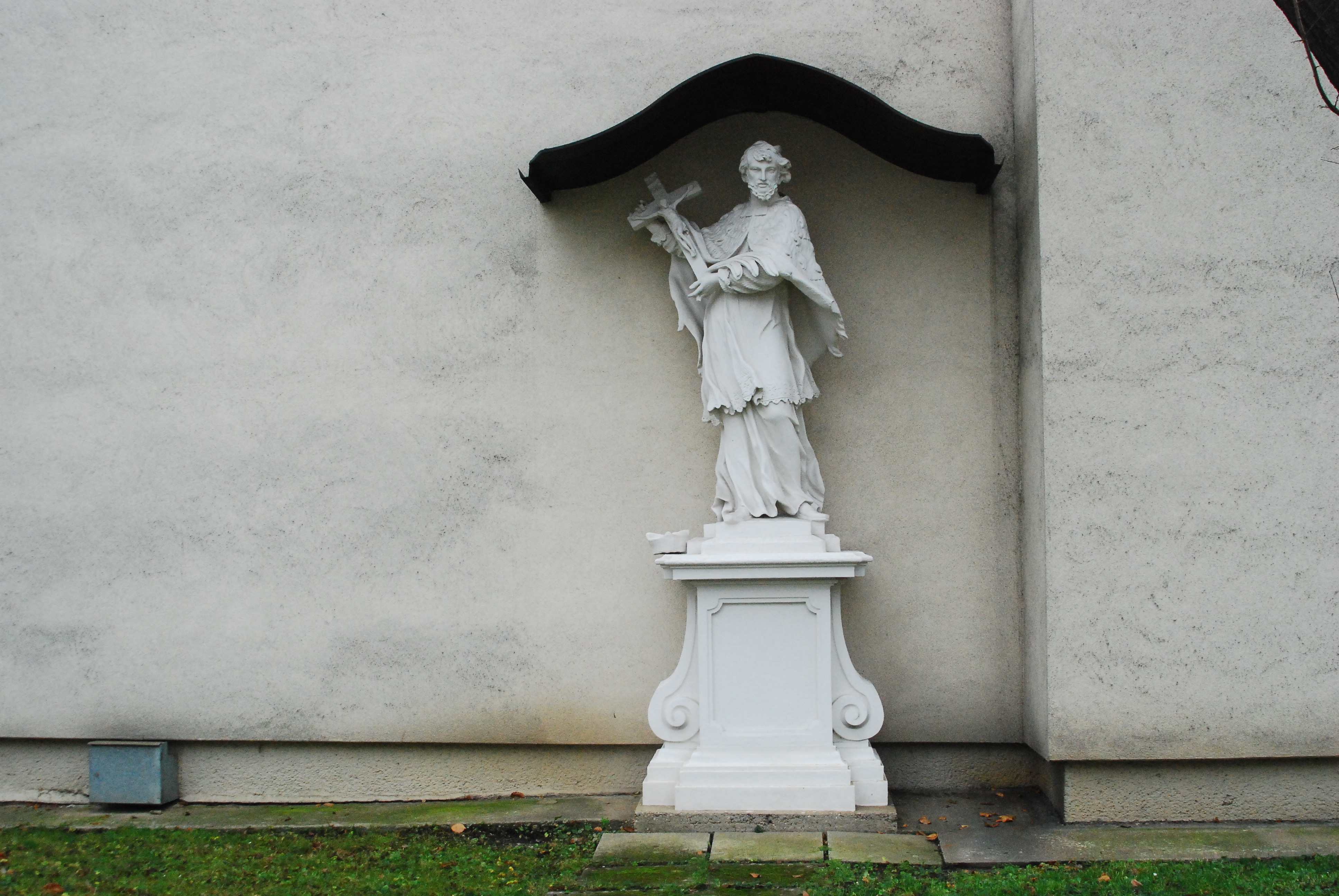 Johannes-Nepomuk-Statue in der Schlögelgasse 41 in Wien-Meidling.